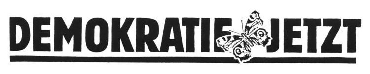 ADN-ZB Repro-9.2.90-ma-Berlin: Signet von Demokratie jetzt. Stammabzug darf nicht aus dem Hause